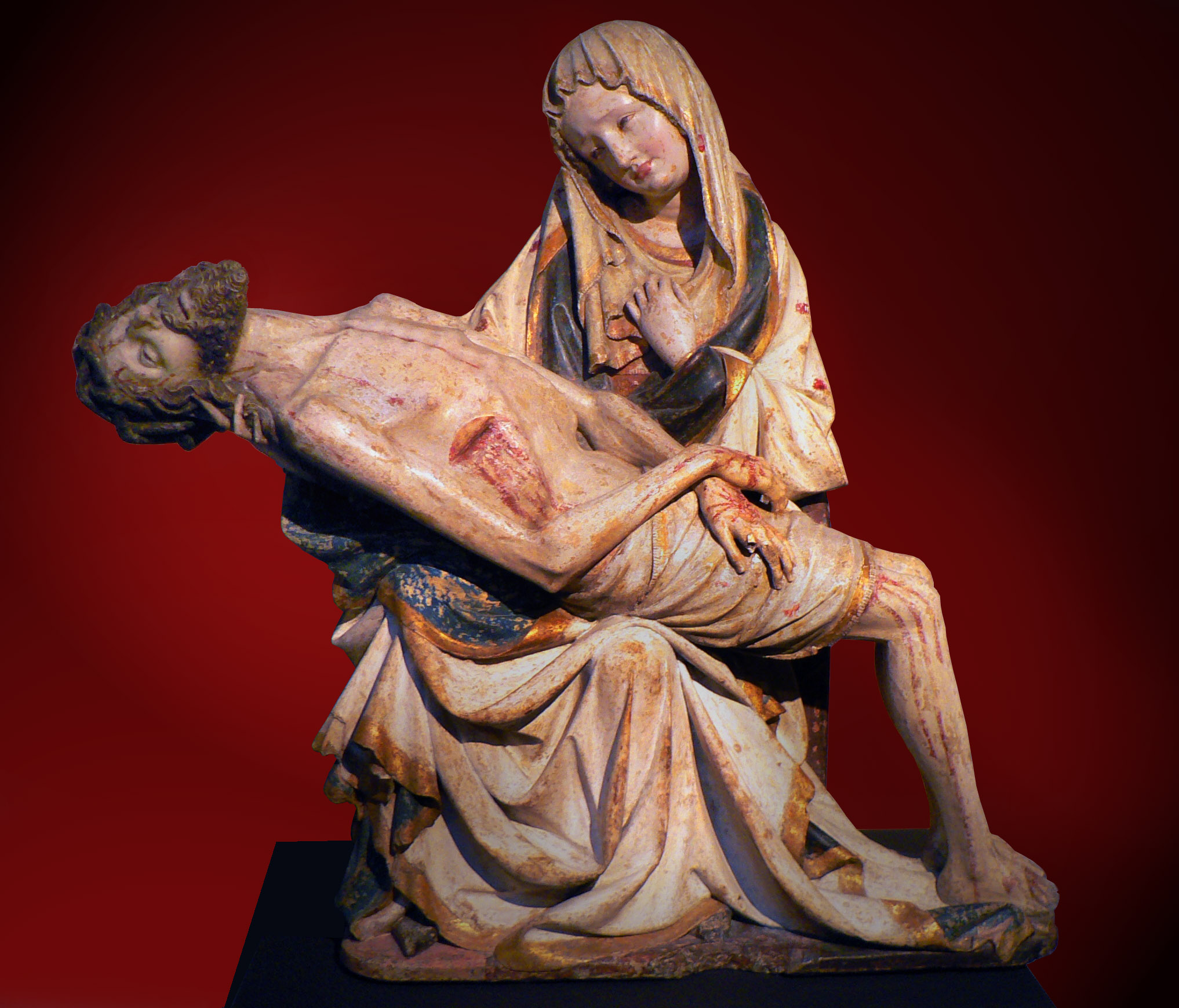 Česky: Tzv. Křivákova Pieta, 1390-1400, Arcidiecézní muzeum v Olomouci